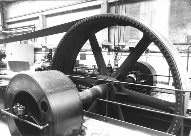 Gent Drongensesteenweg zonder nummer